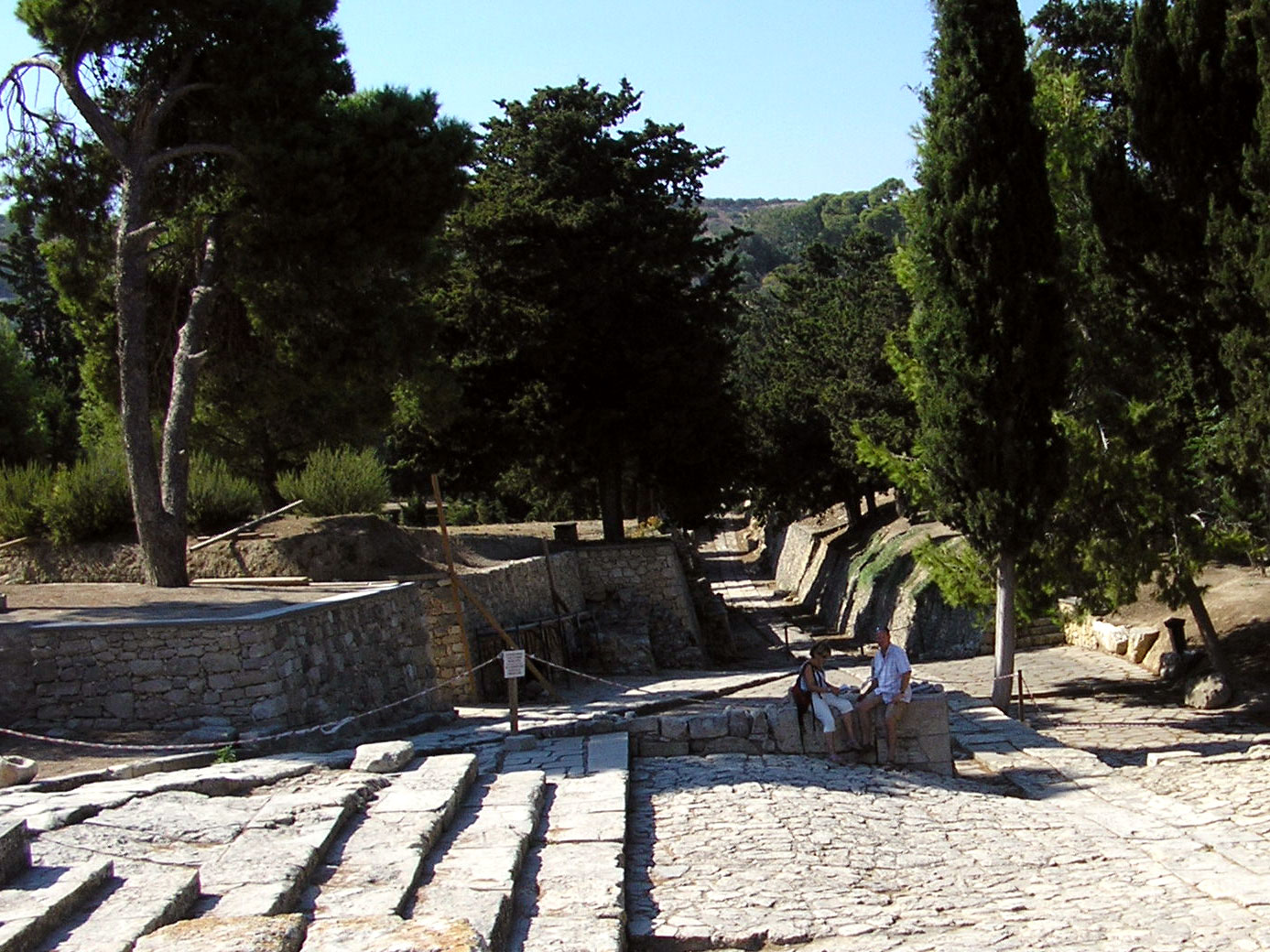 мінойці винайшли технологію будування довговічних шляхів за багато сторіч до римлян